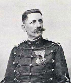 Le capitaine Léon Moreaux en 1900 (champion de France seniors au fusil Lebel).